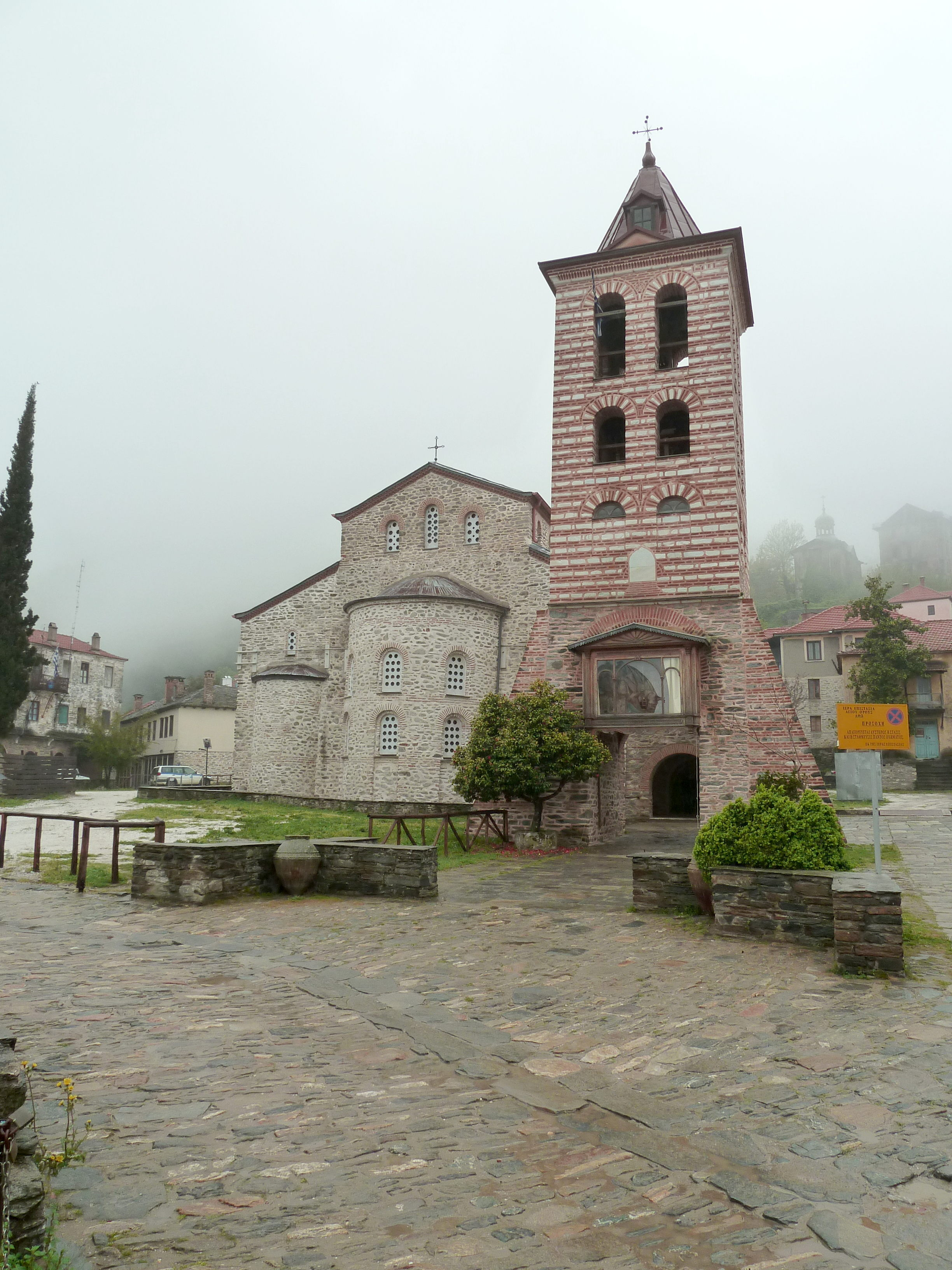 Le Protaton, église principale de Karyes (Mont Athos)